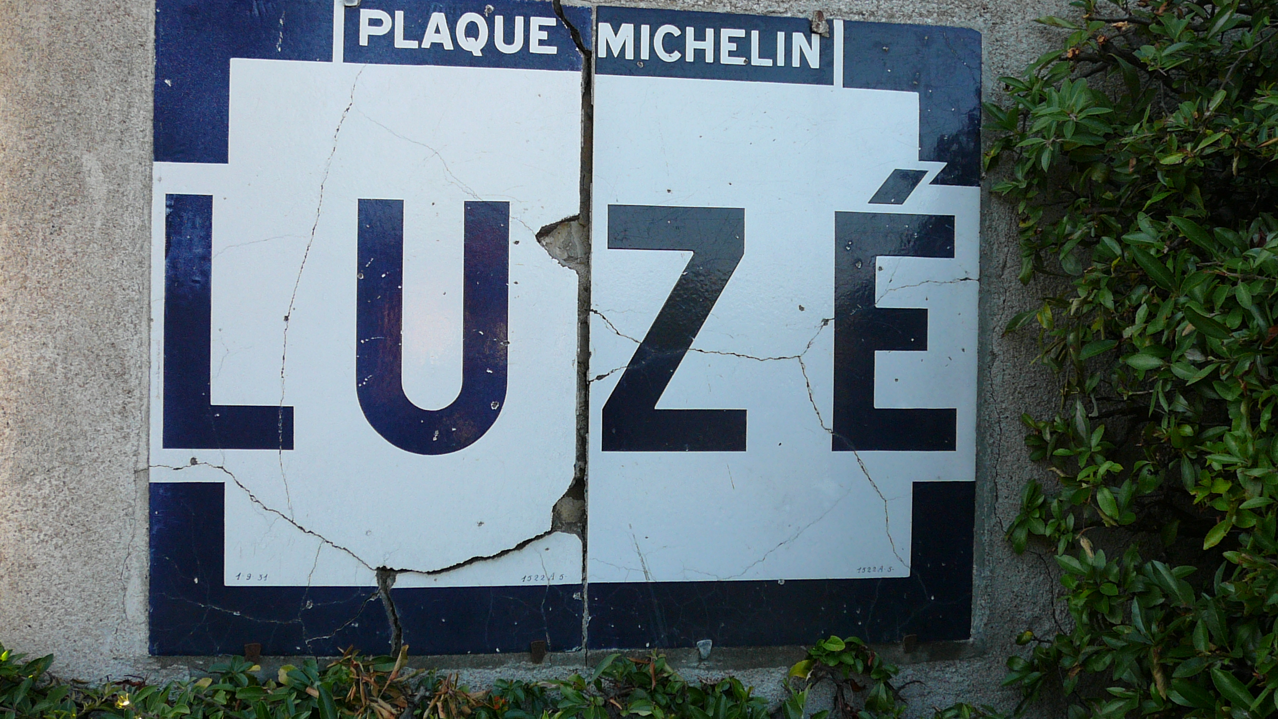 Plaque Michelin de la ville de Luzé prise en 2008.